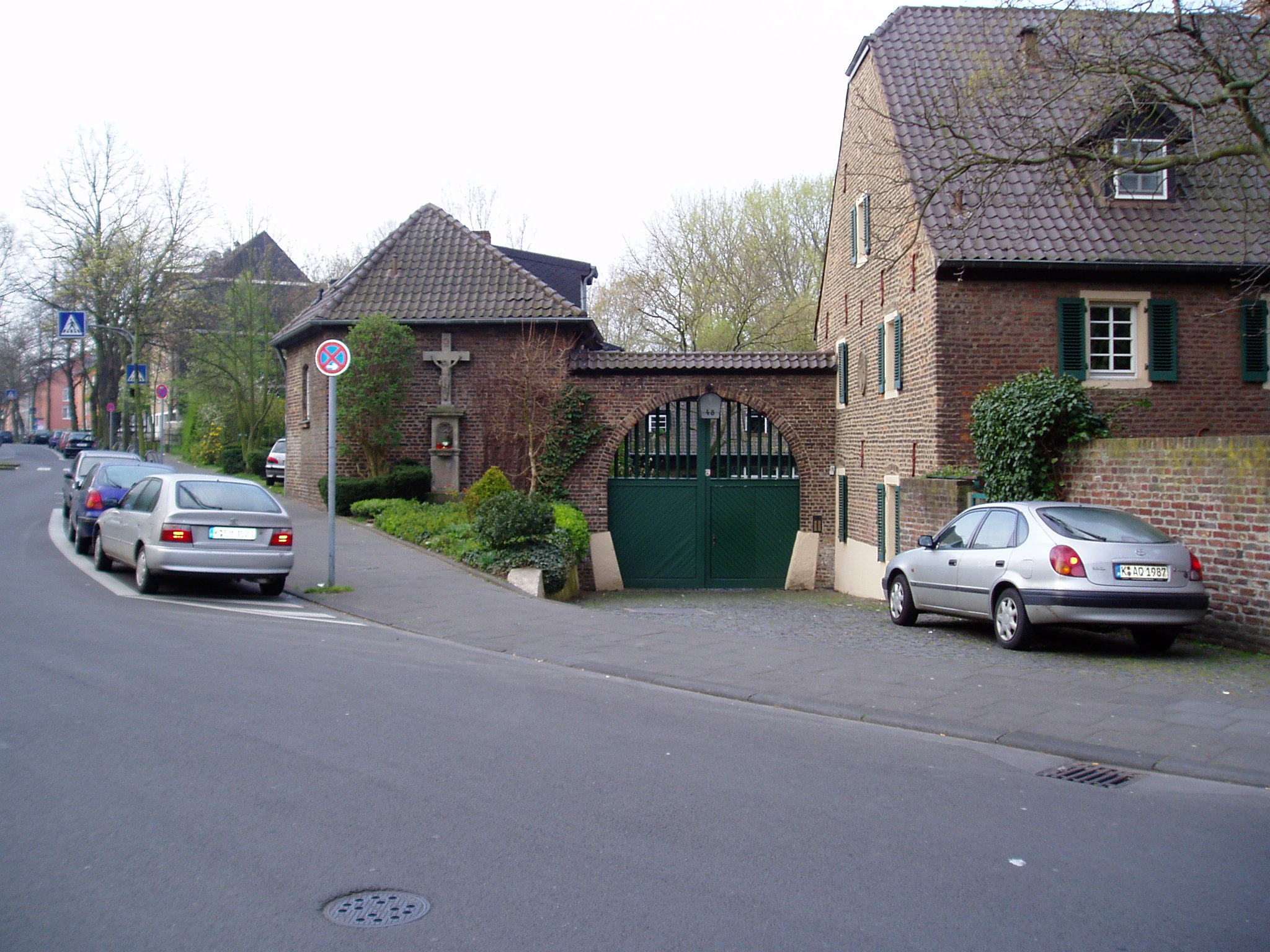 Vingster Hof